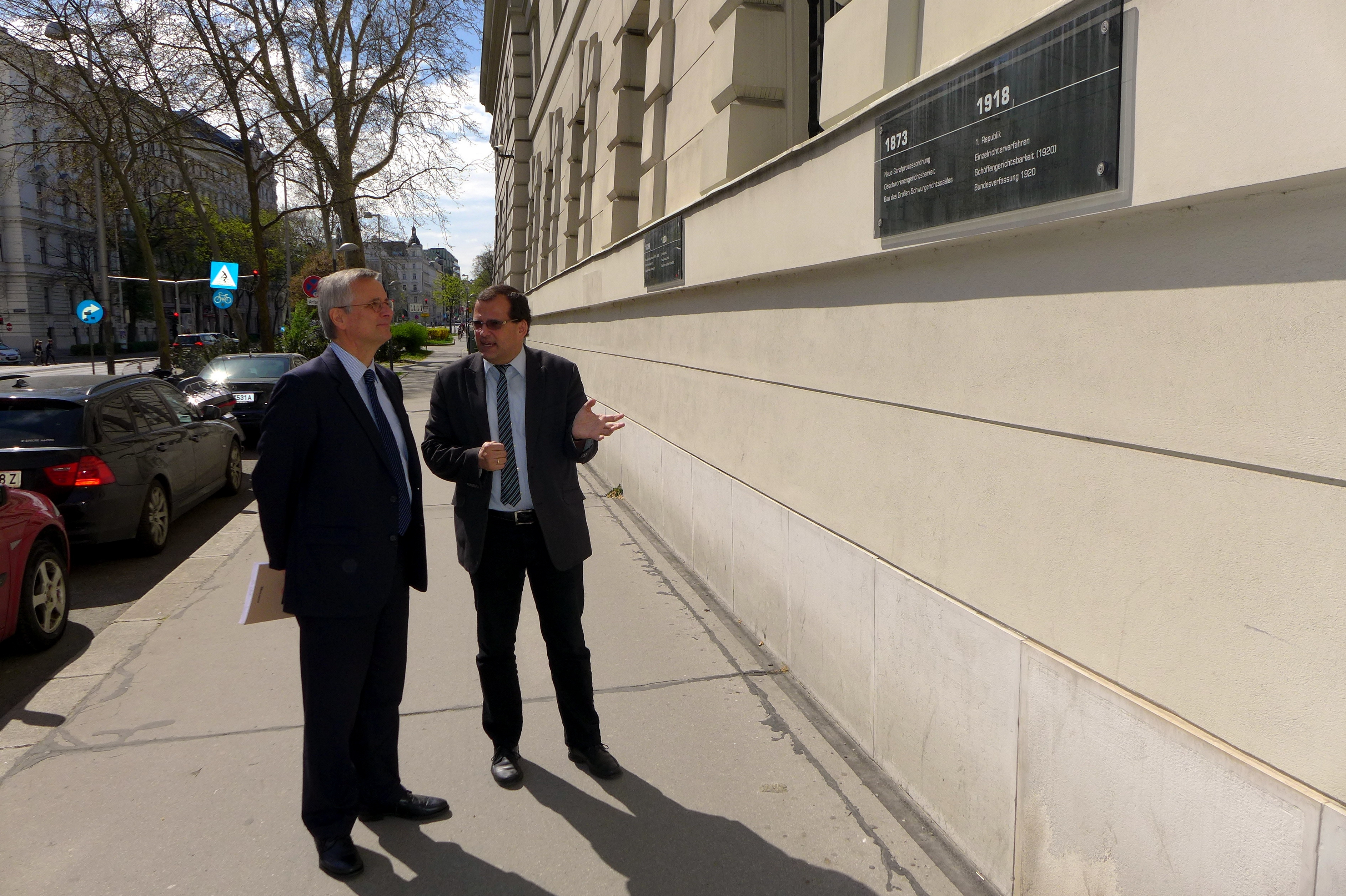 Friedrich Forsthuber und Detlev Rünger, Botschafter der Bundesrepublik Deutschland in Österreich, vor Gedenktafel am Landesgericht für Strafsachen Wien, 15. April 2015